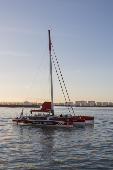 Fenetrea quitte le port du Havre afin de prendre le départ de la Transat Jacques Vabre 2015